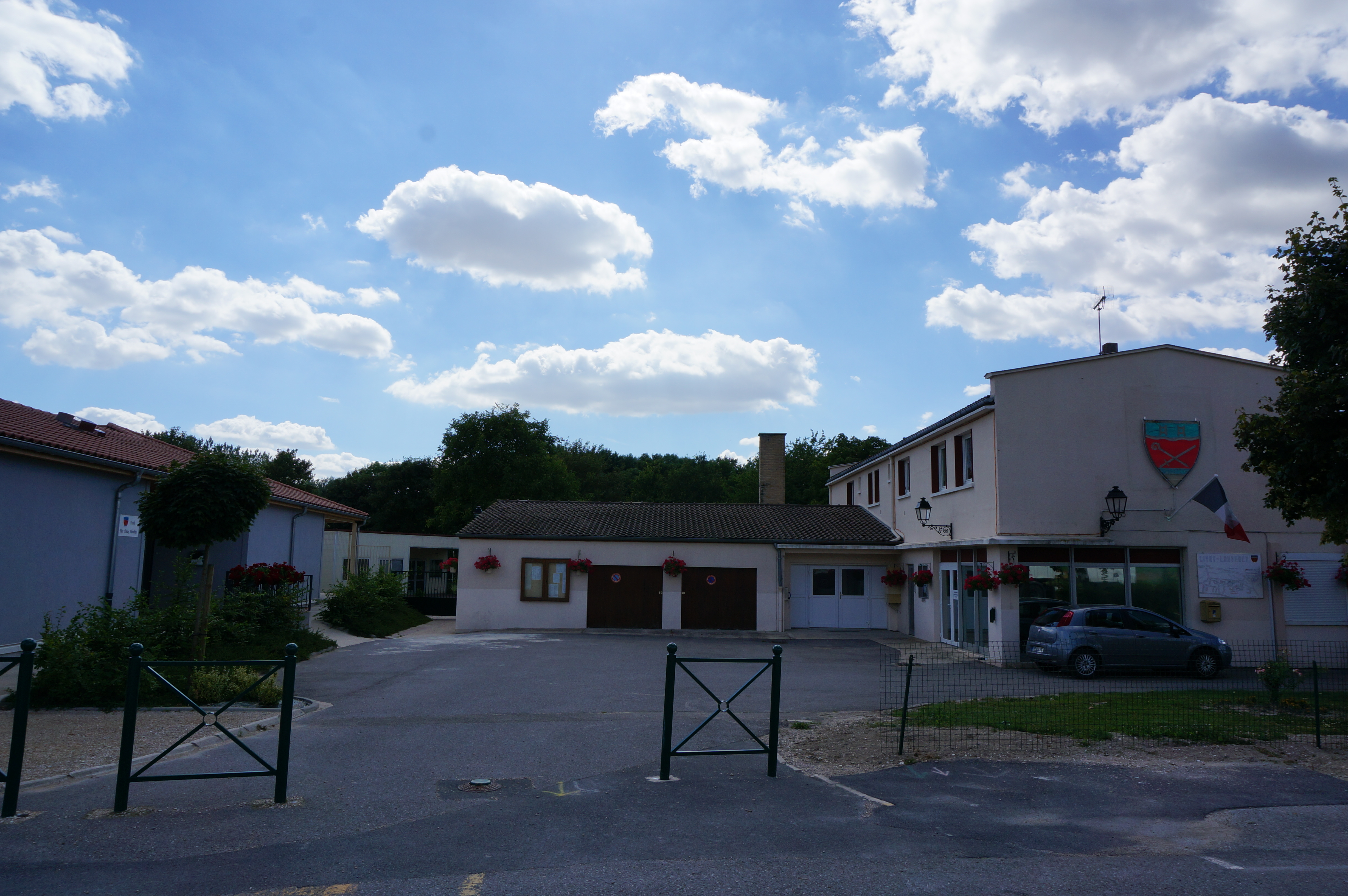 à Livry-Louvercy.